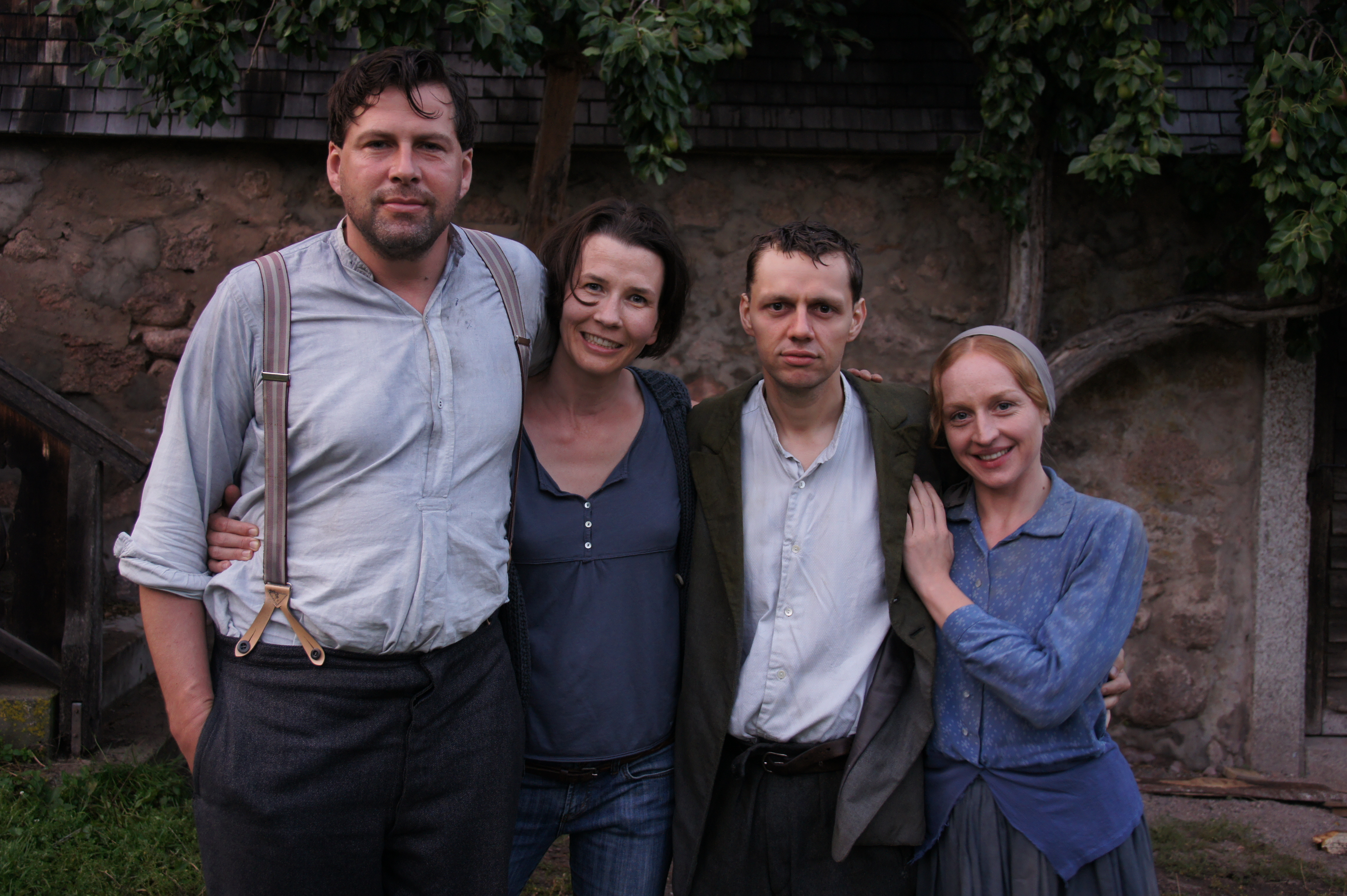 Darsteller und Regisseur des Films "Ende der Schonzeit": Hans-Jochen Wagner, Franziska Schlotterer, Christian Friedel und Brigitte Hobmeier